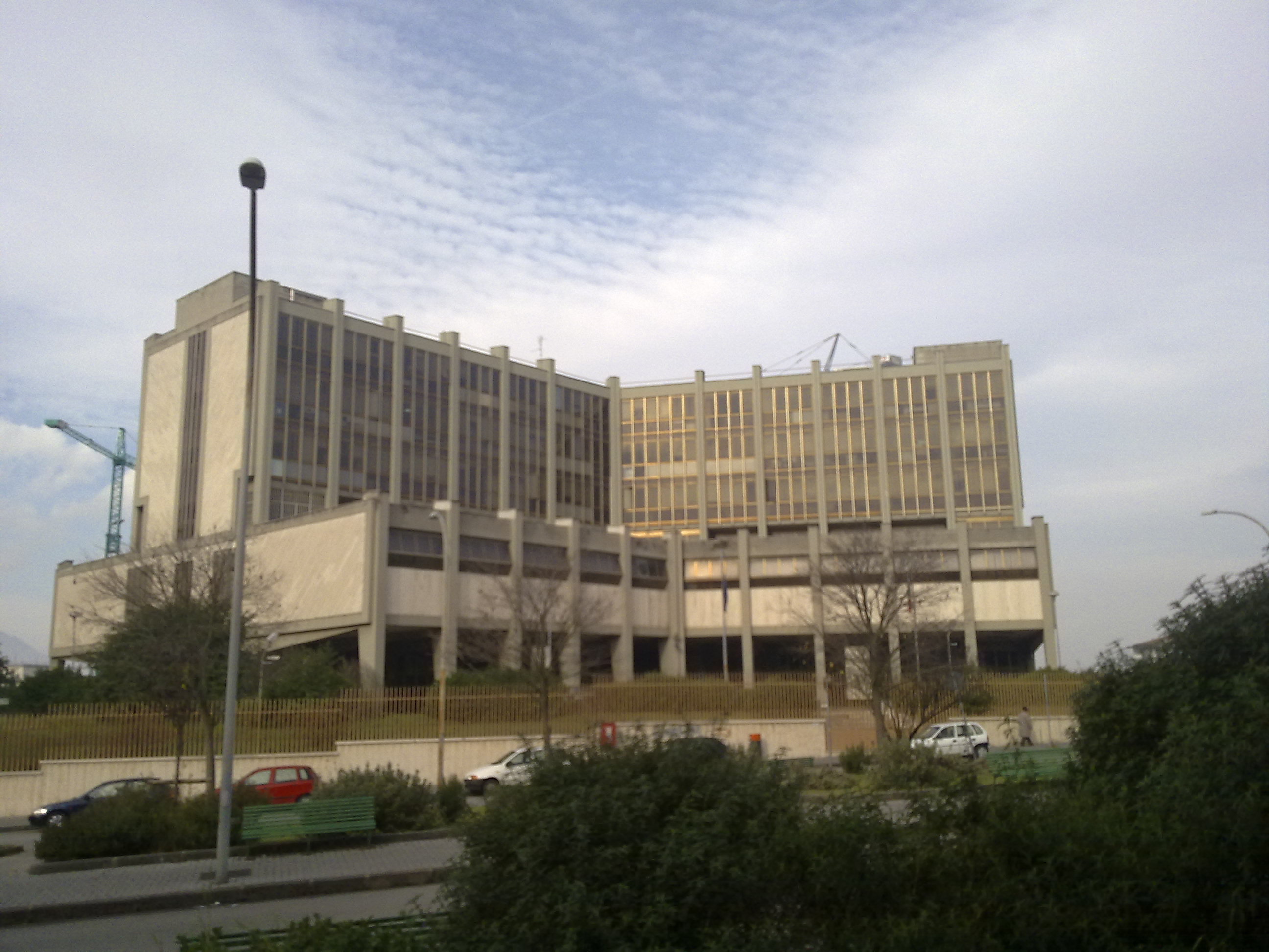 Francesco M. Mazza da archivio. Palazzo di giustizia Benevento.